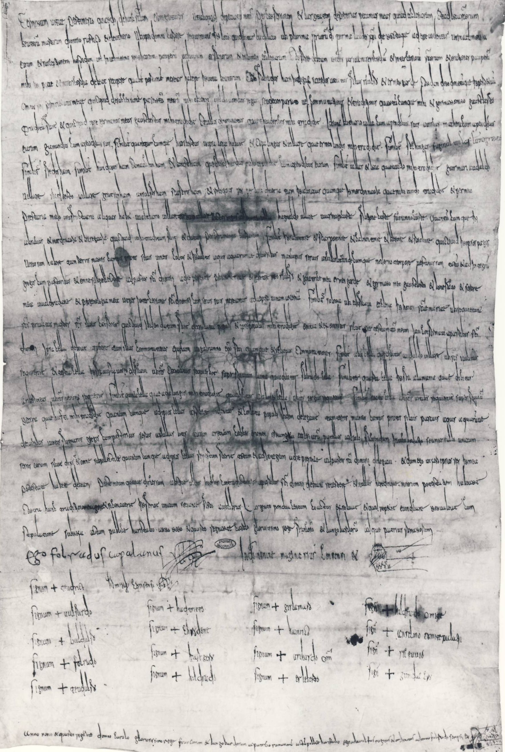 Testament de l'abbé Fulrad confirmant la donation qu'il a faite à l'abbaye de Saint Denis, signé en 777 à Herstal, résidence de Pépin le Bref et Charlemagne